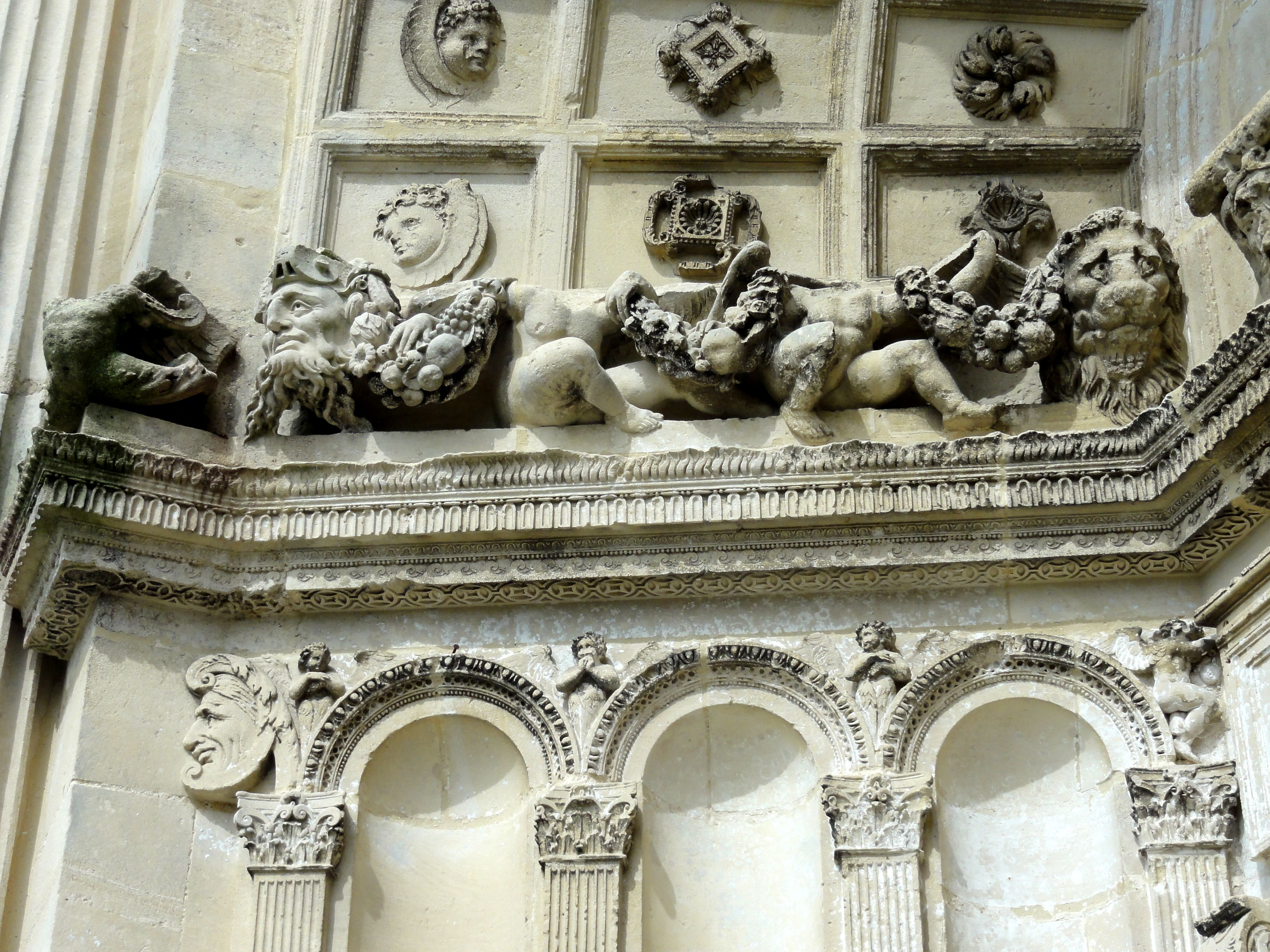 Détail du portail.